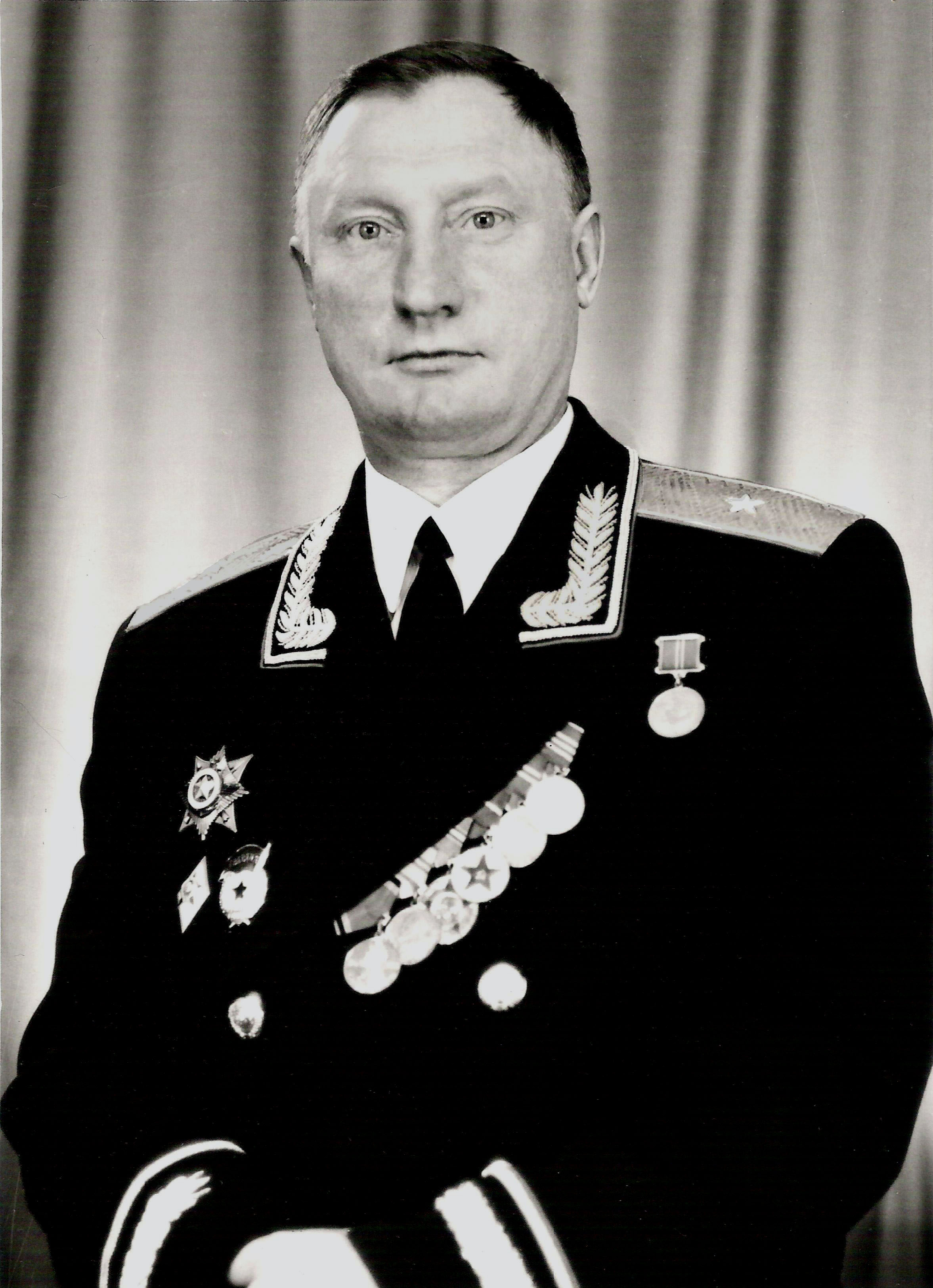 генерал-майор Пивоваров Валентин Николаевич, май 1981 года, 39-я ГМСД